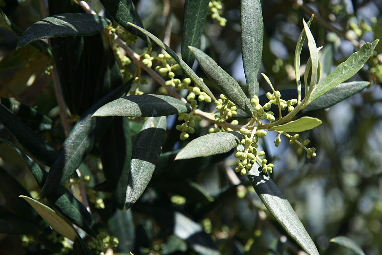 L'olivier, fortement alternant, explose de fleurs les années on year (2020)